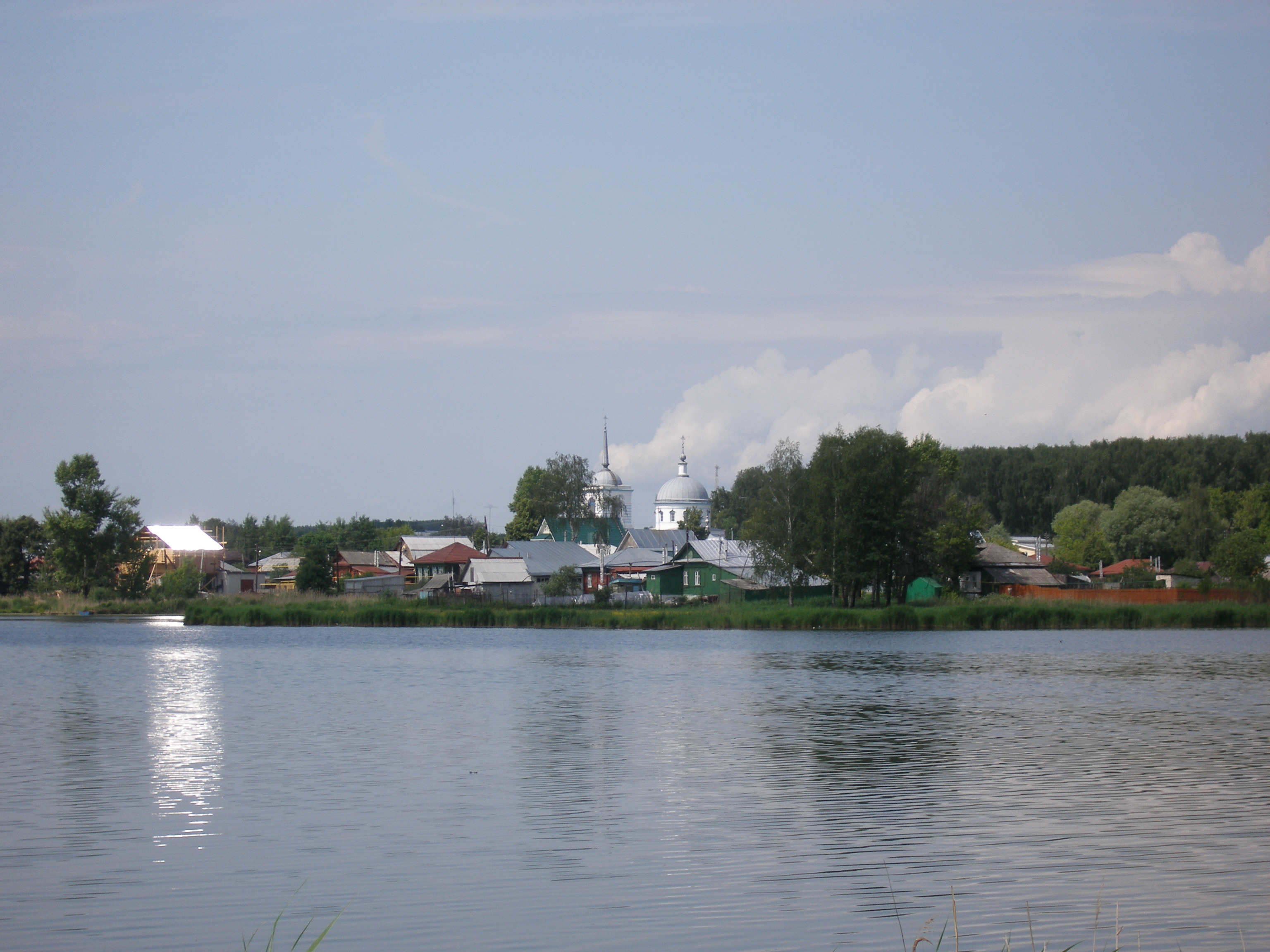 Ворсма, Нижегородская область